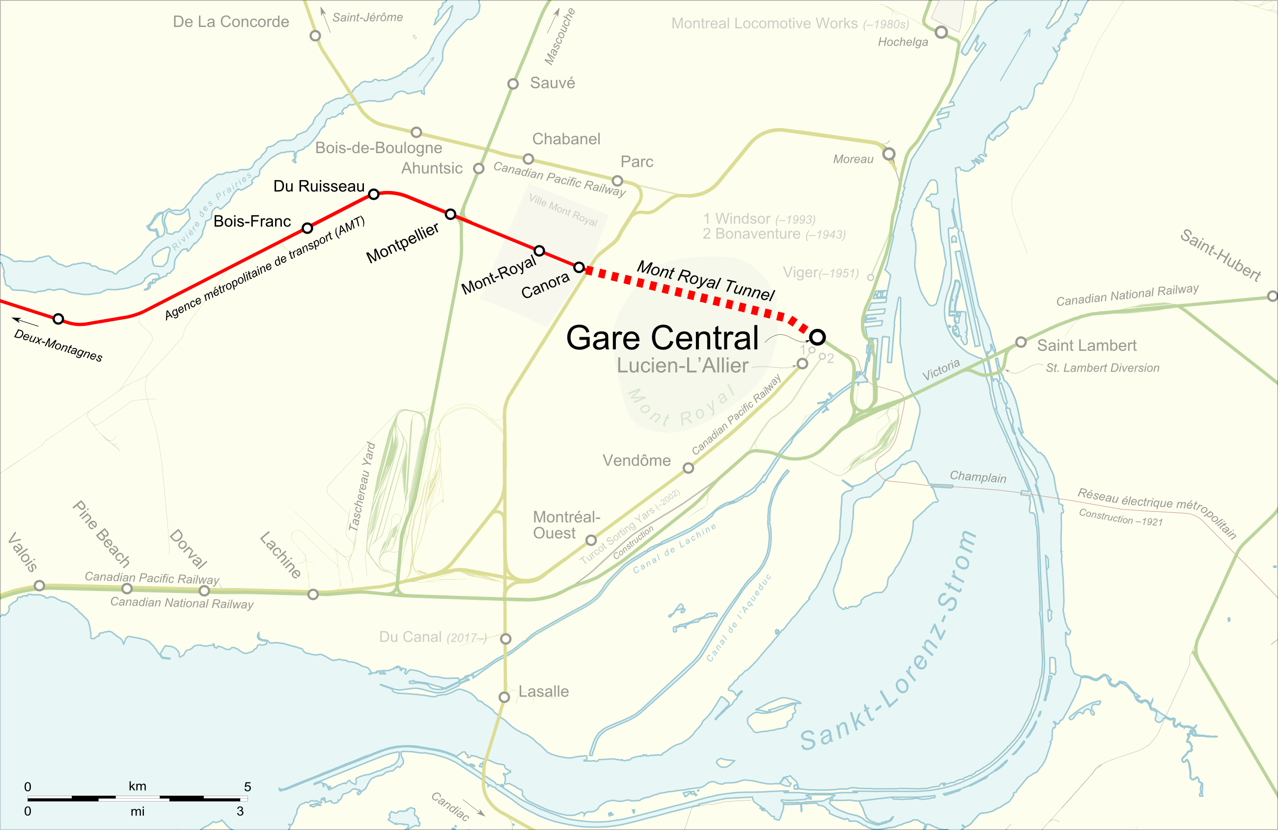 Karte des Tunnels durch den Mont Royal in Montreal, Kanada